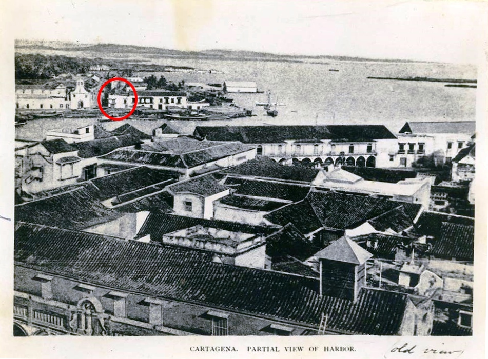 Fotografía tomada en 1892 por Clímaco Calderón Reyes